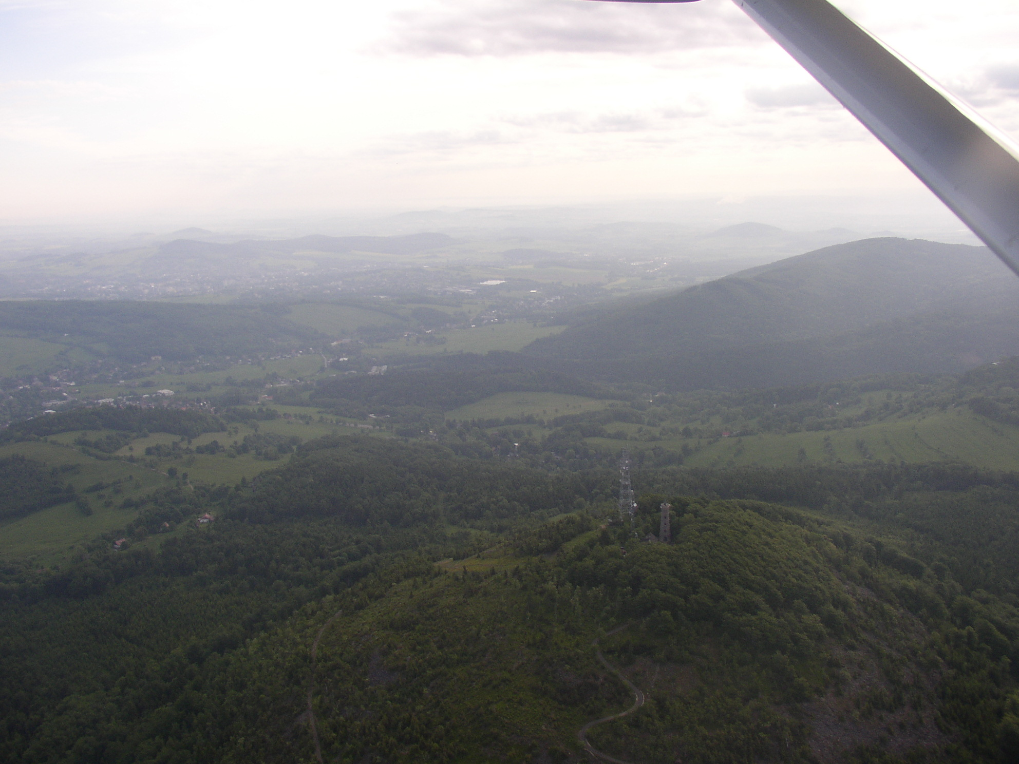 Luftbild von Gipfel Berges Jedlová, Czech republic